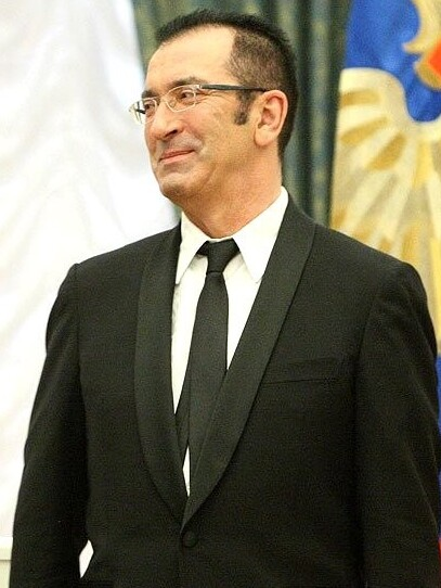 Певец Александр Буйнов